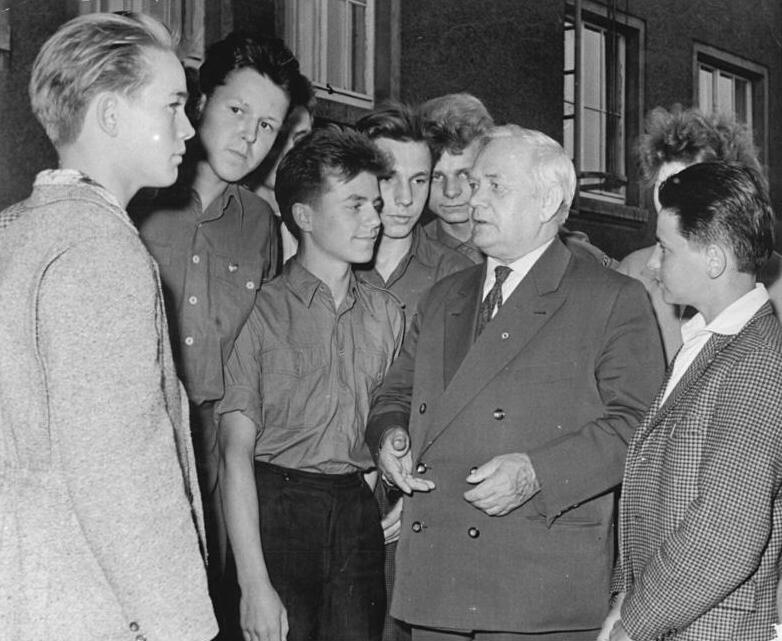 Bitterfeld, 1. Arbeiterfestspiele, Hans Marchwitza mit FDJ Zentralbild Schmidt 18.6.1959 1.Arbeiterfestspiele in der DDR. Am Mittwochabend, dem 17. Juni 1959, fand im Kulturpalast "Wilhelm Pieck" des Elektrochemischen Kombinats Bitterfeld eine literarisch musikalische Veranstaltung des Tribüne-Verlages statt, auf der sich bekannte Schriftsteller wie Nationalpreisträger Hans Marchwitza, Inge von Wangenheim, Heinrich-Mann-Preisträger Heinrich Jobst und andere vorstellten. UBz: Der Schriftsteller Nationalpreisträger Hans Marchwitza im Gespräch mit FDJ'lern der Farbenfabrik Wolfen, die zur Zeit in der Farbenfabrik Wolfen arbeiten.